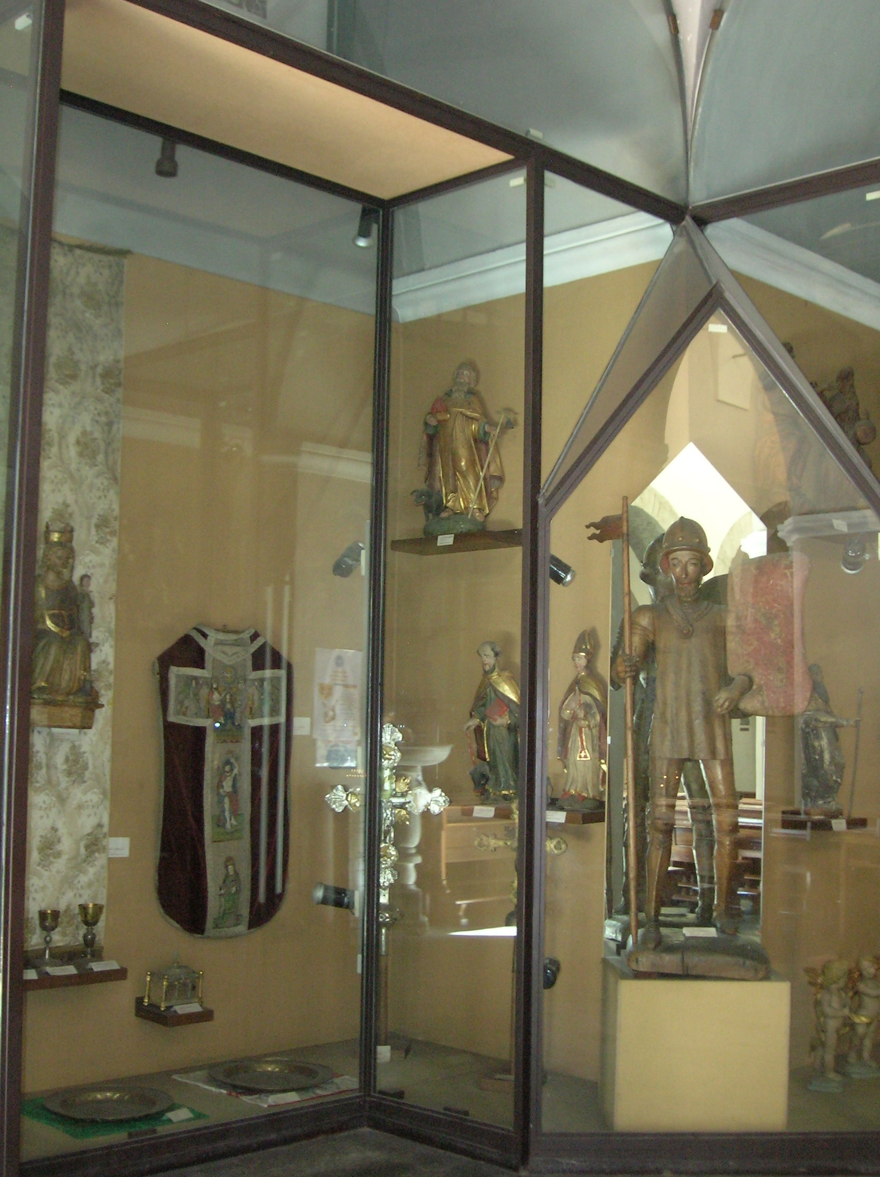 Chiesa di San Vincenzo, Saint-Vincent, Valle d'Aosta, Italia.